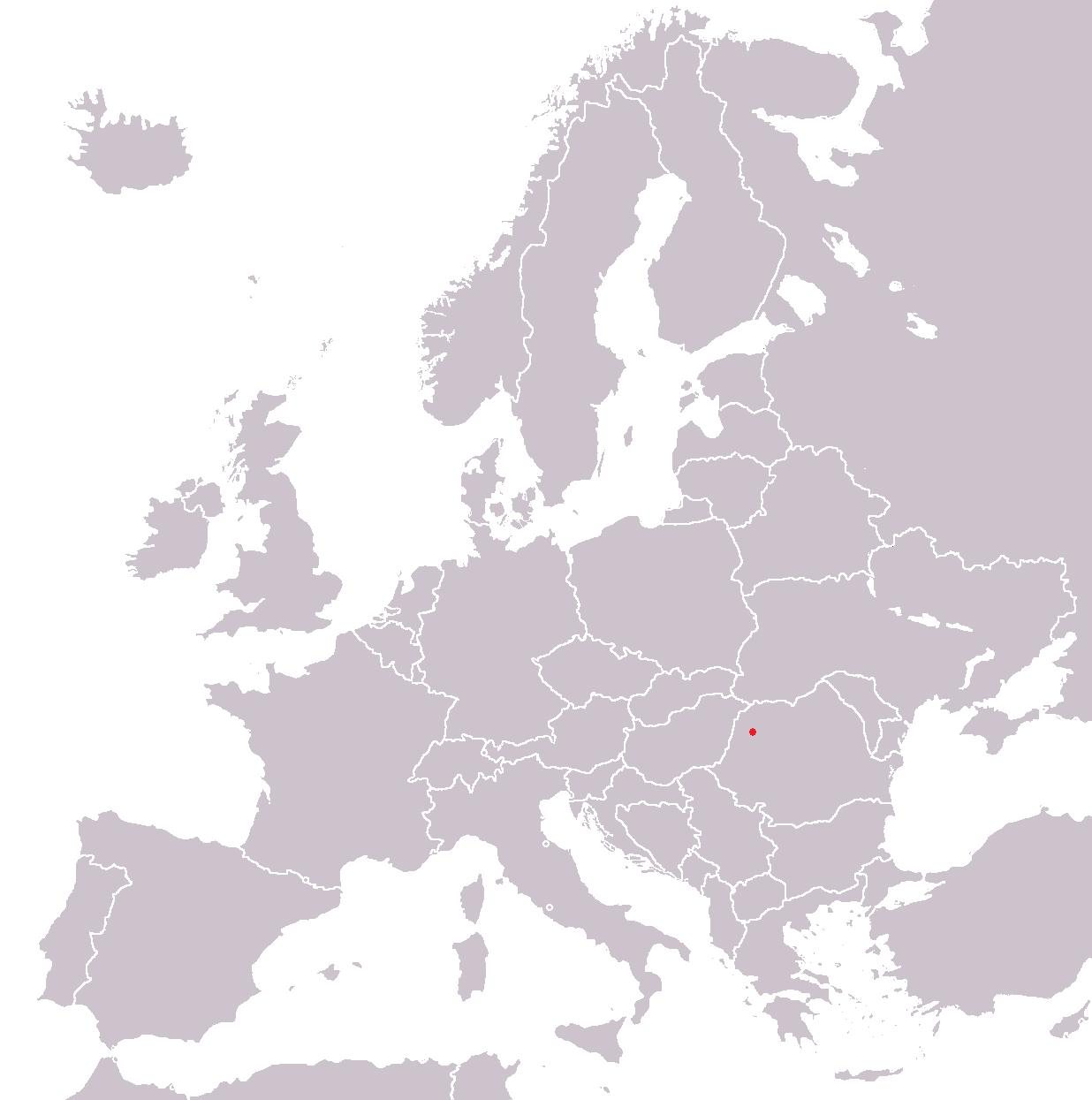 Giurtelecu Simleului in Europe